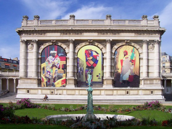 Palais Galliera, musée de la mode, Paris 16e. Vu depuis l'avenue du Président-Wilson.